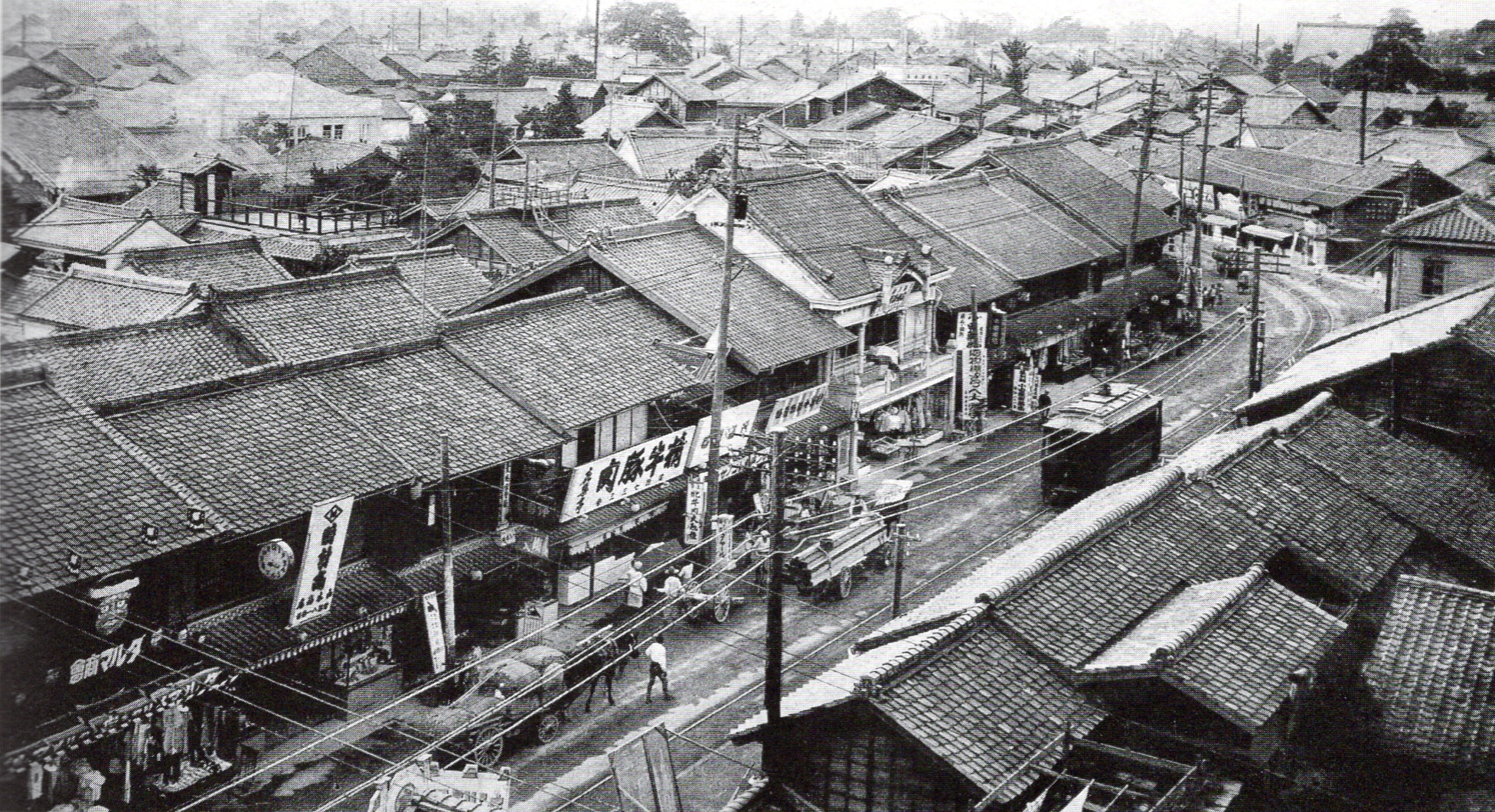 愛知県岡崎市。昭和初期の本町通り